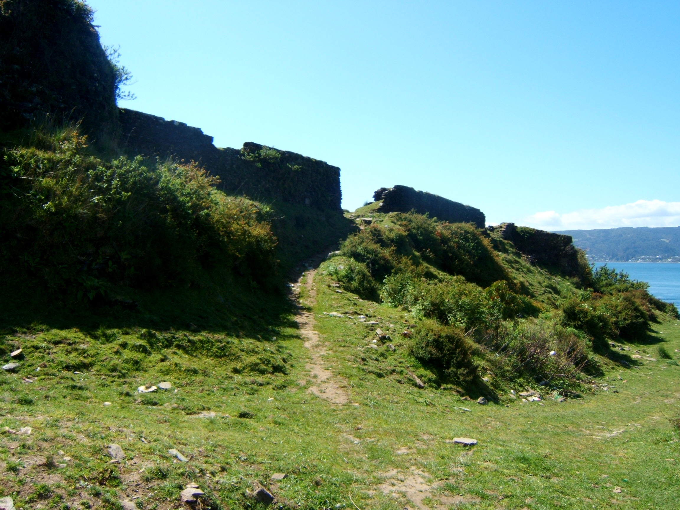 Fuerte San Luis de Alba de Amargos This is a photo of a national monument in Chile: 169